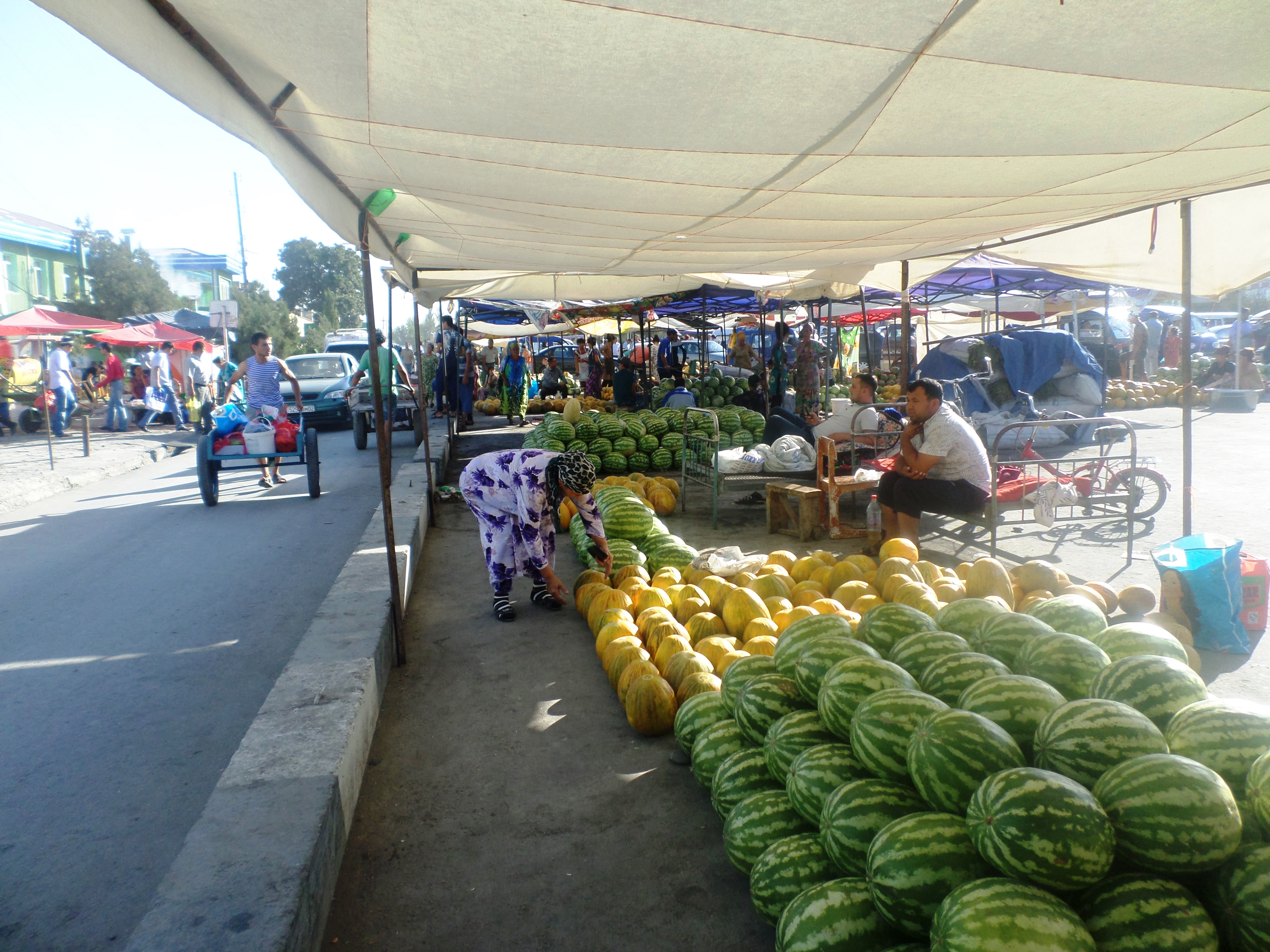 Уличный рынок в Спитаменском районе Согдийской областиТоҷикӣ: Бозори ноҳияи Спитамен дар вилояти Суғди Тоҷикистон